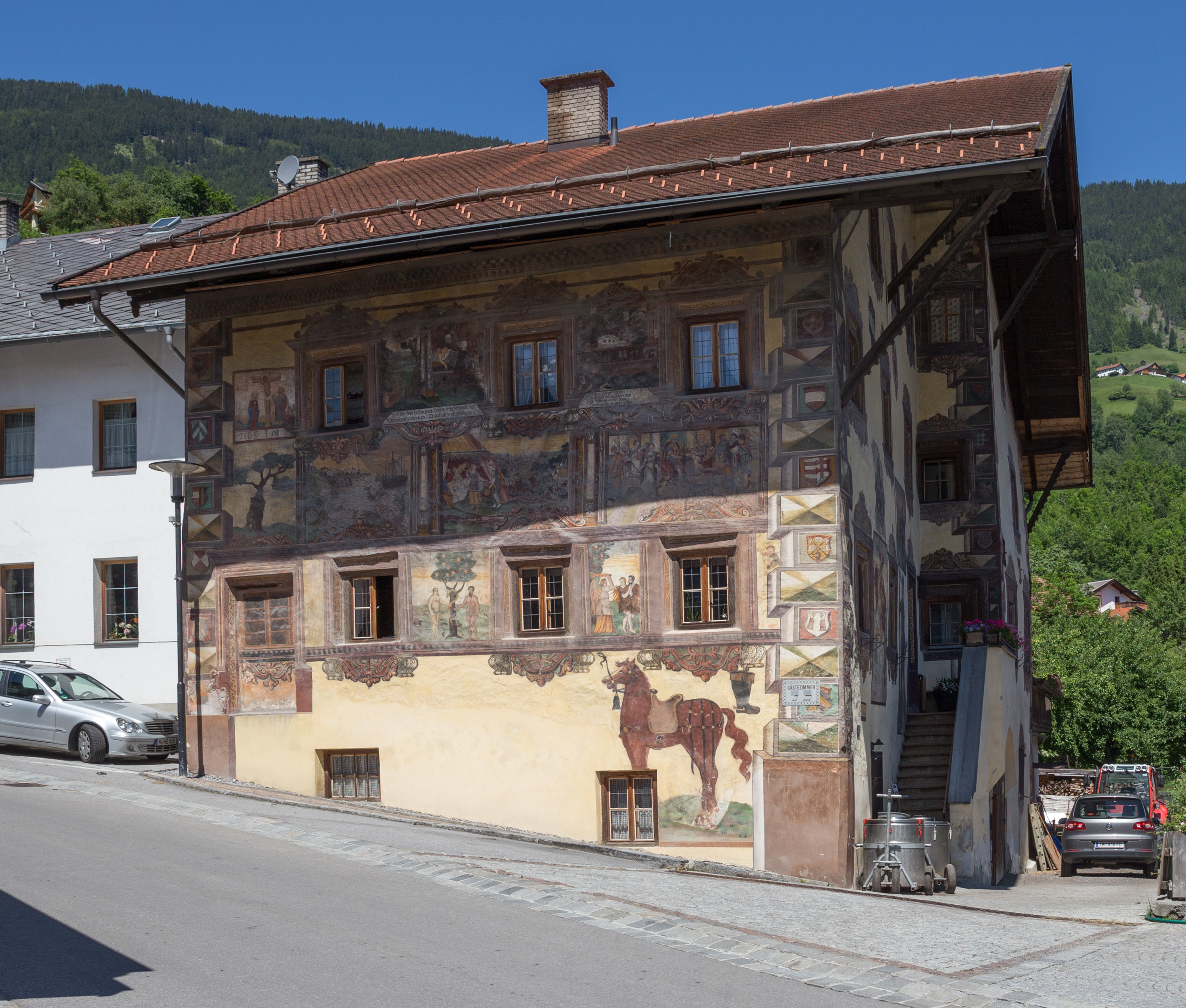 AT 13533 Richterhaus Wenns, Tirol